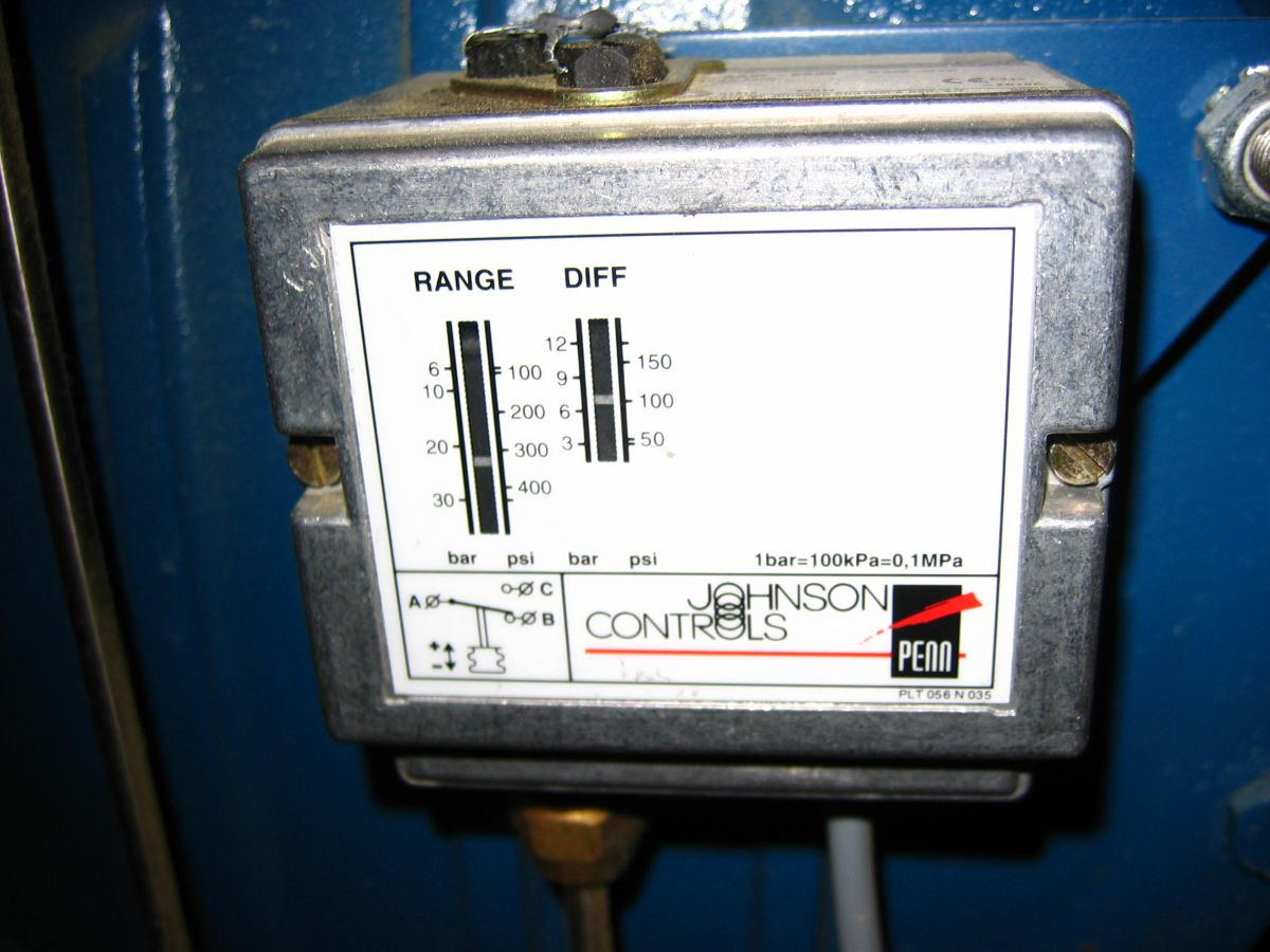 bauteilgeprüfter Druckbegrenzer an einer Kälteanlage